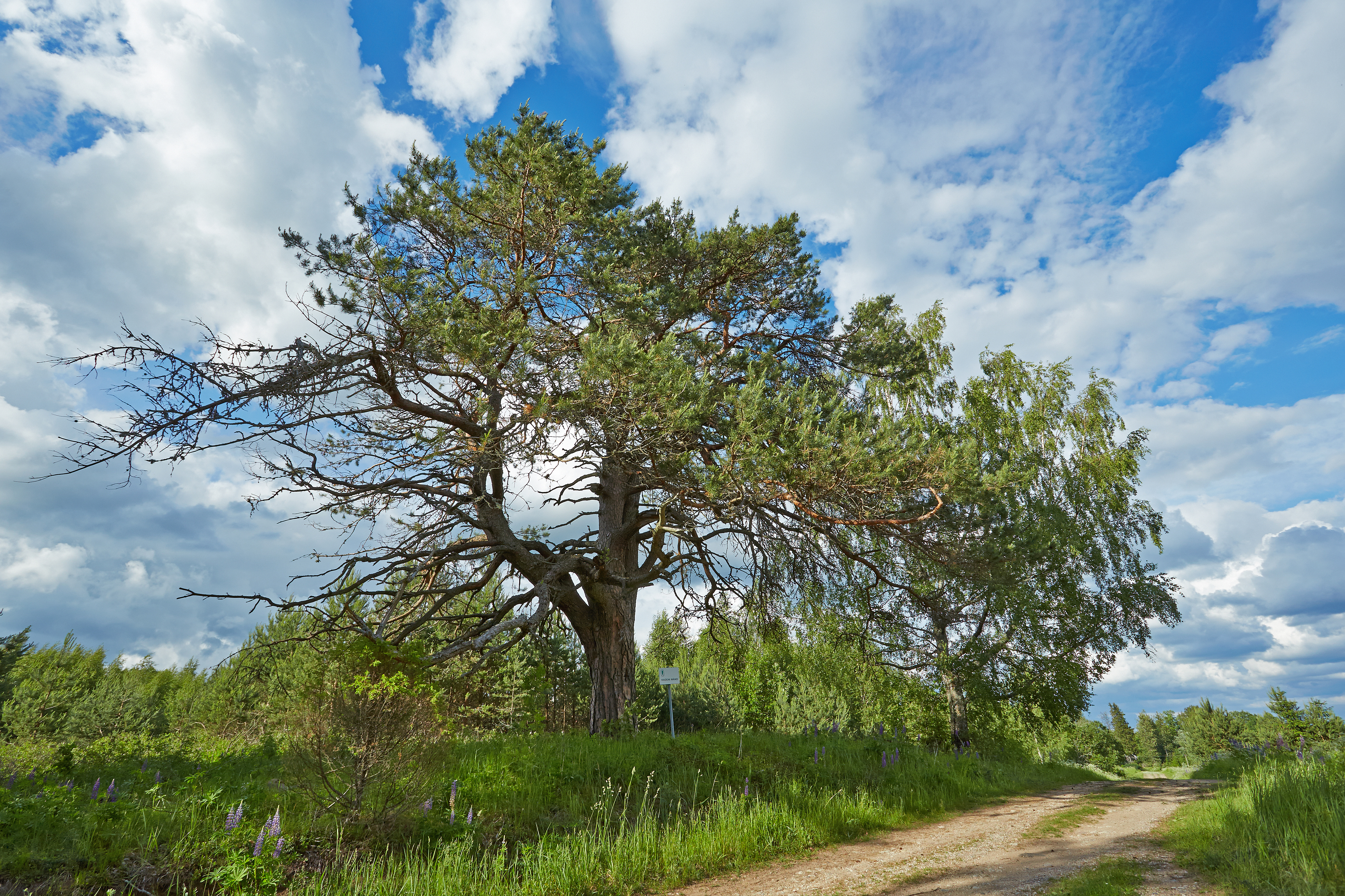 Kadeni mänd